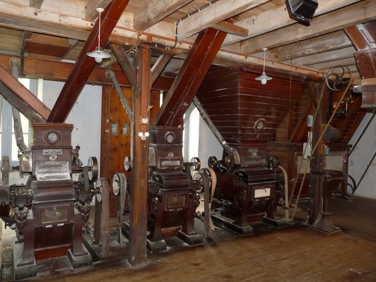 Broyeurs, moulin Sartier, Salles-Lavalette, Charente, France